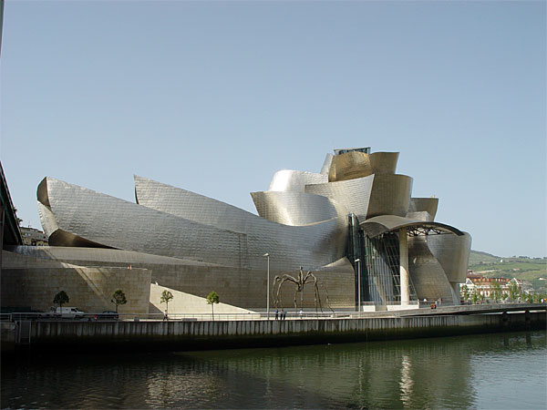 Guggenheim Museum, Bilbao, Basque Country, Spain.